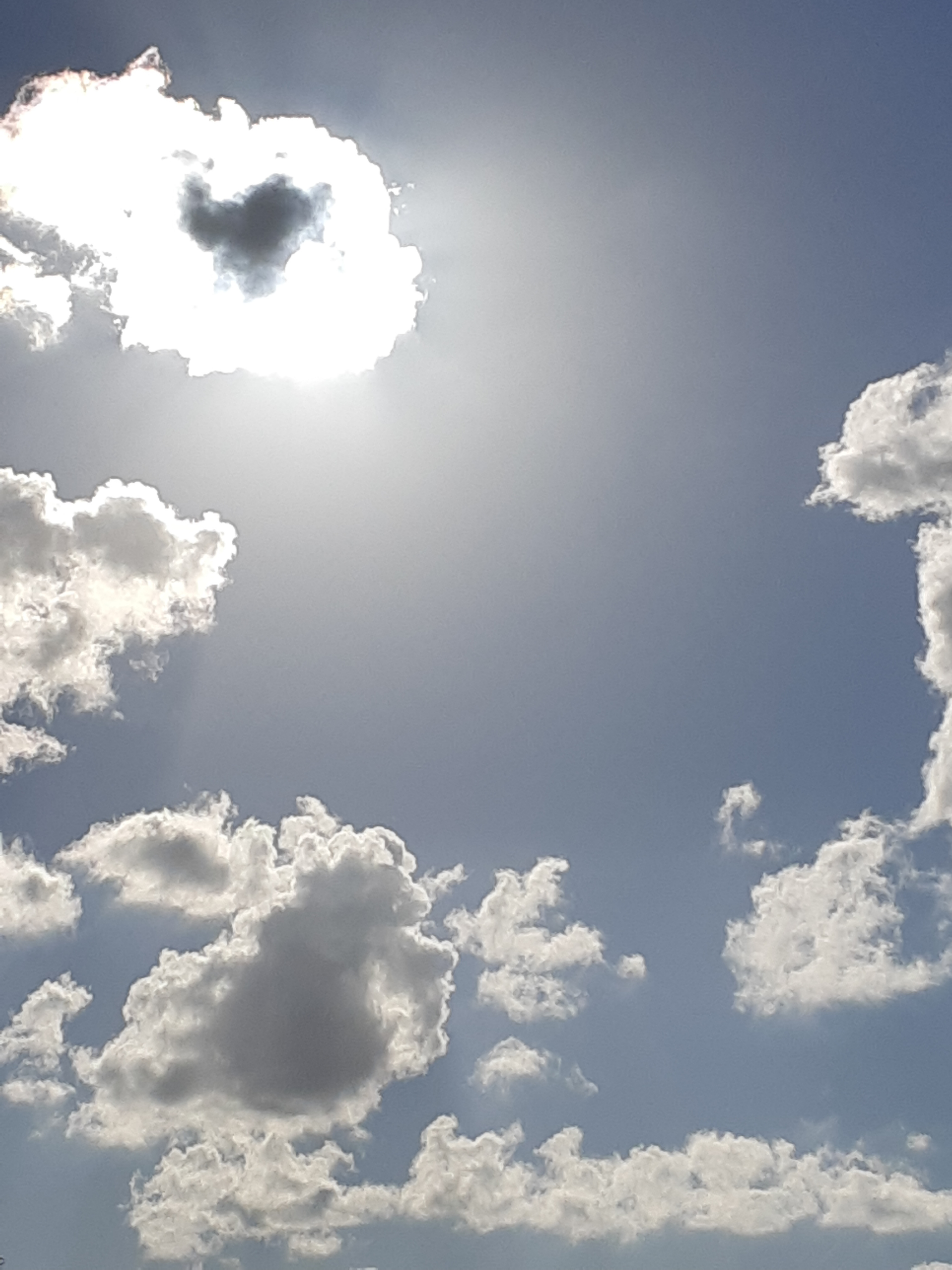 שמש מכוסה בענן ושמים עם עננים